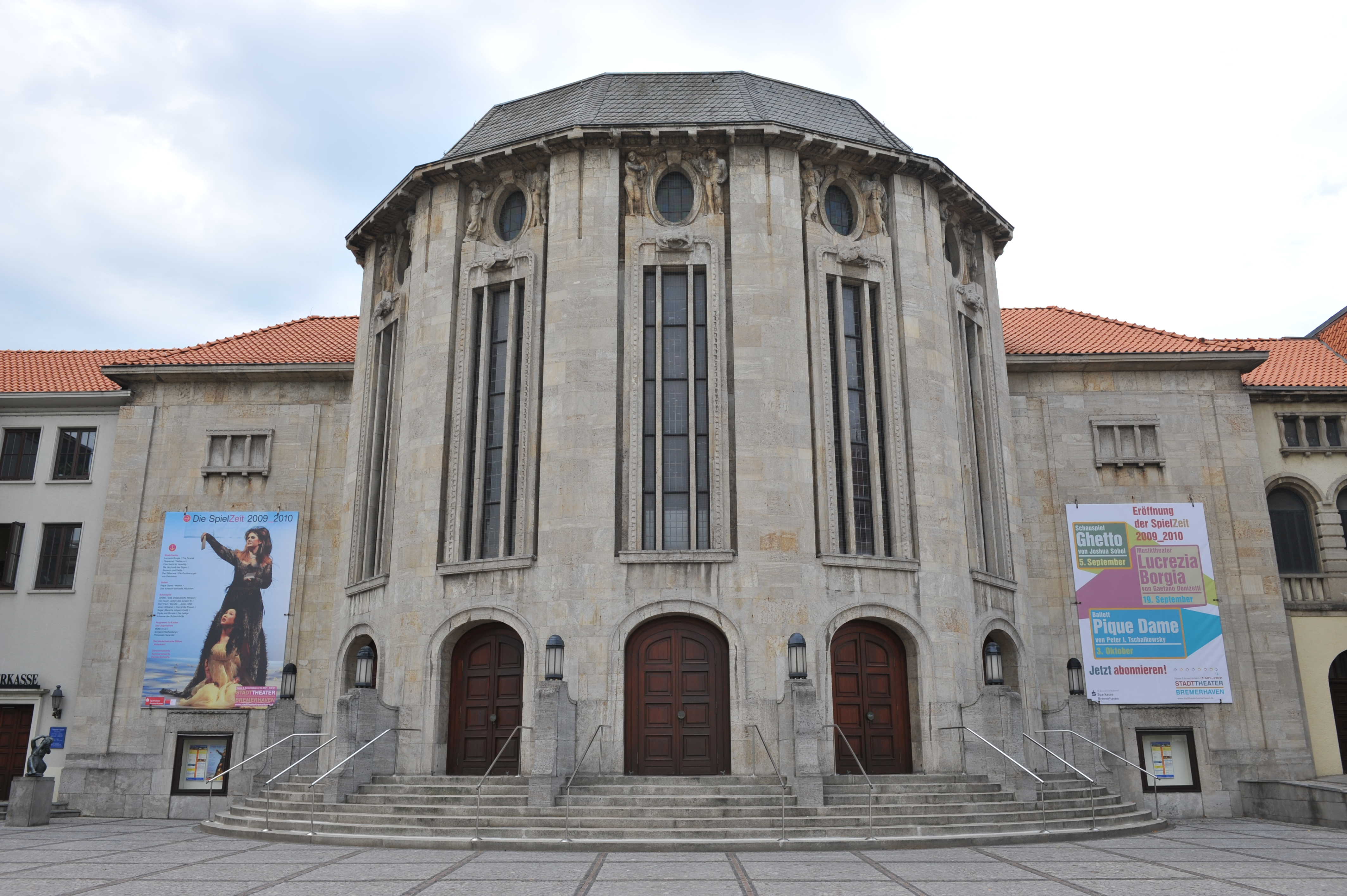 Historical building in Bremerhaven, northern Germany Stadttheater, Theodor-Heuss-Platz 4, 1911-1914 von Oskar Kaufmann, Wiederaufbau 1951-1952 (1977)